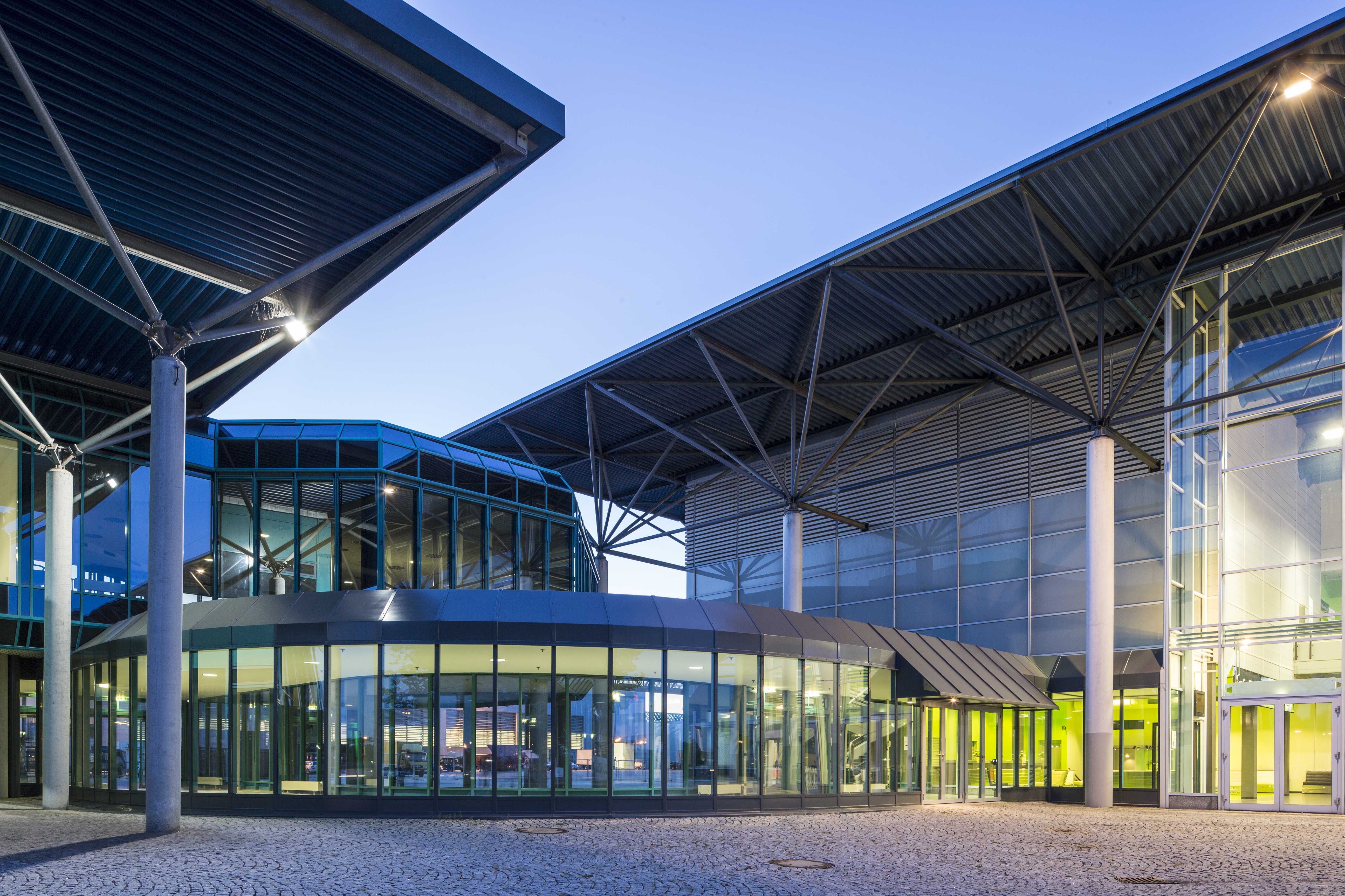 Messe Augsburg Conference Center